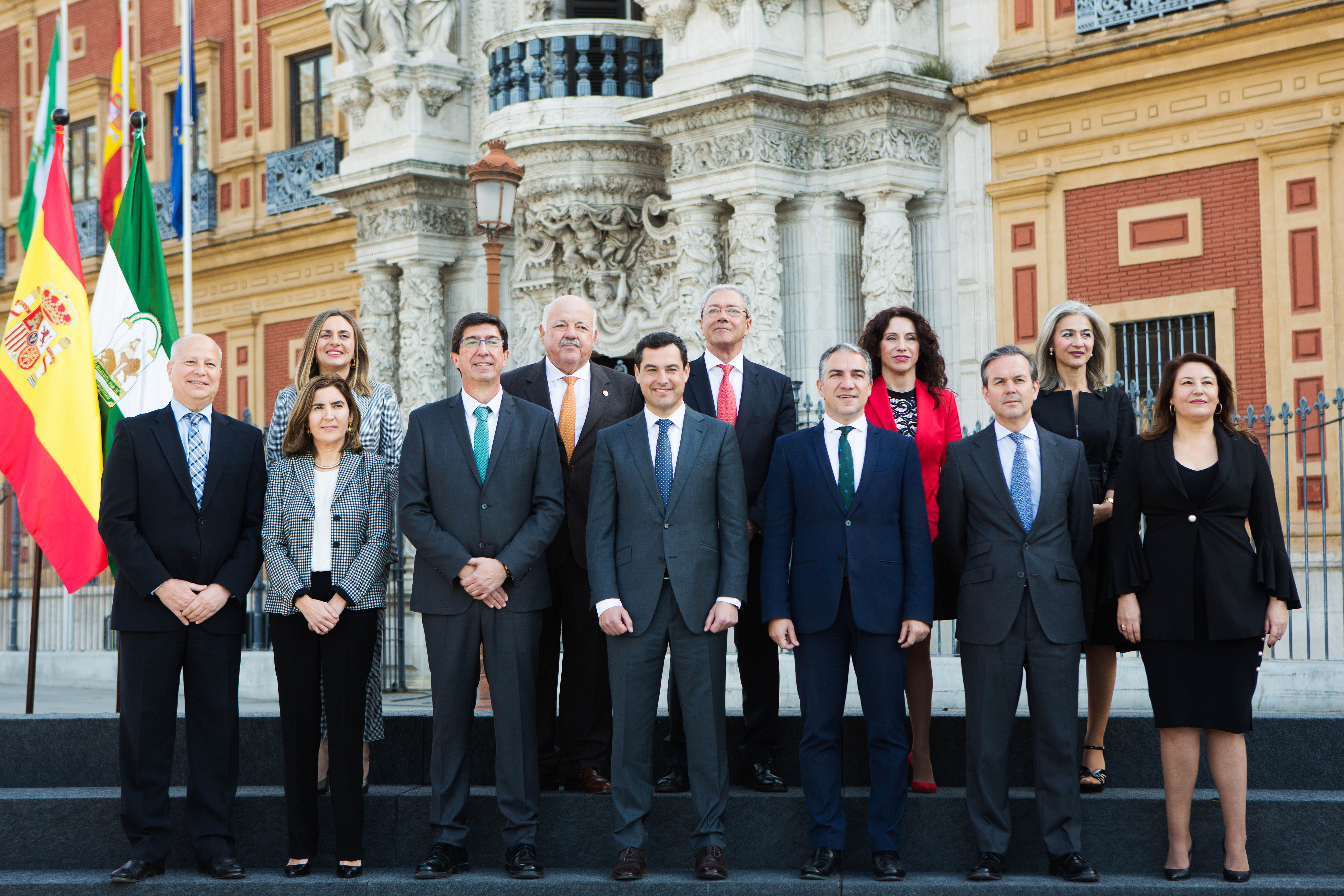 El Consejo de gobierno de Juan Manuel Moreno.